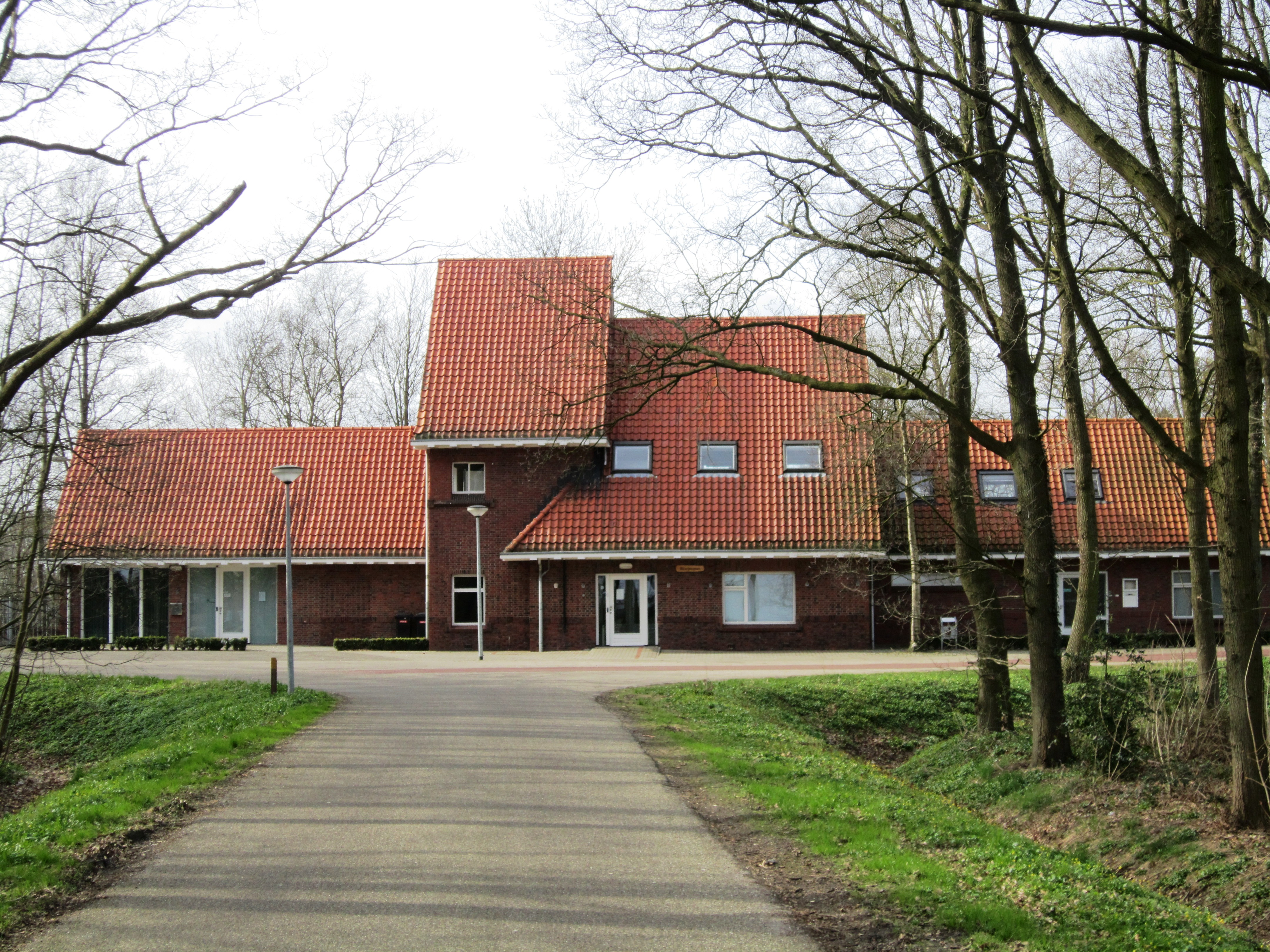 Slochteren IPA 4